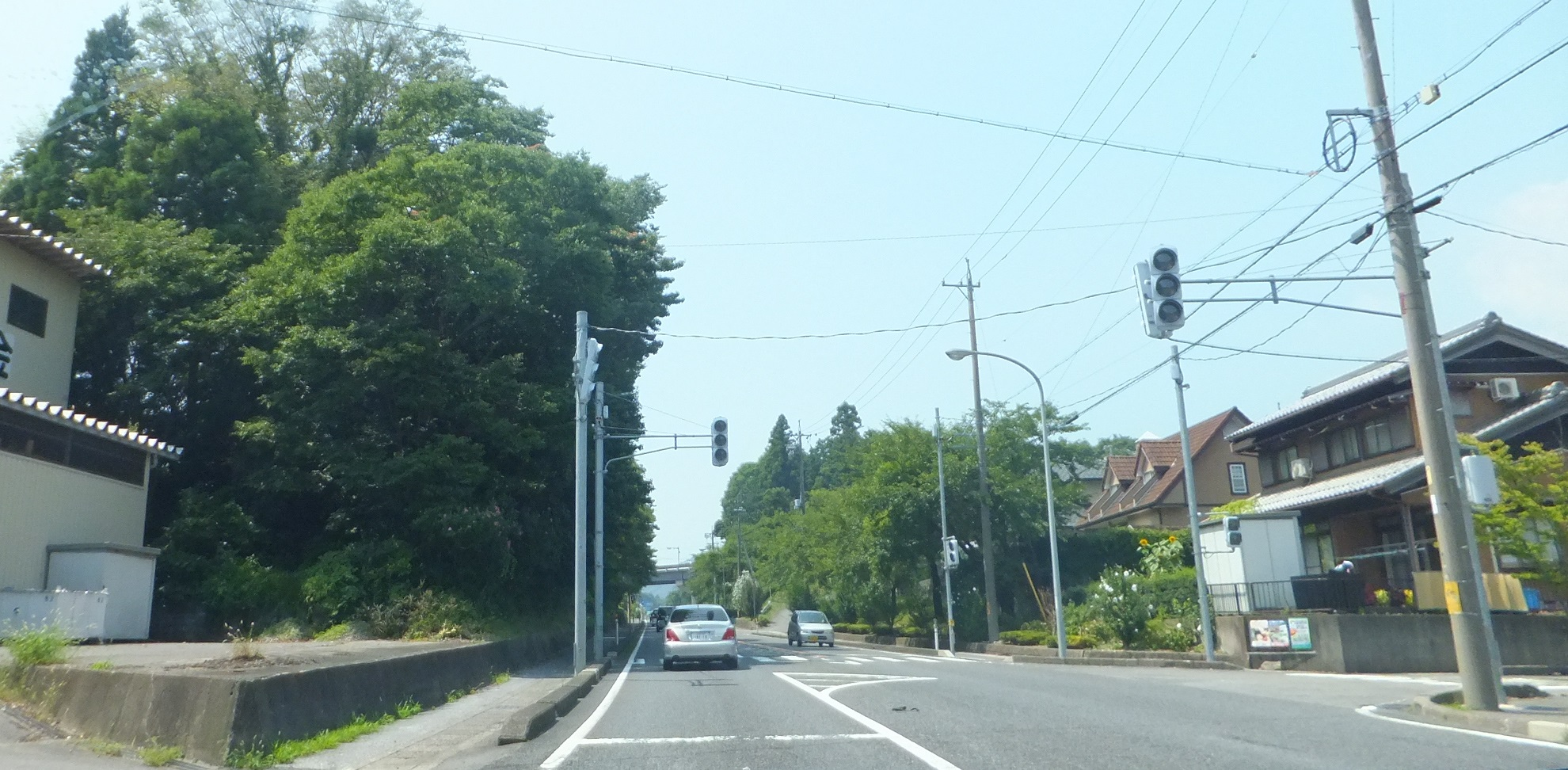 岐阜県不破郡関ケ原町小池 国道365号